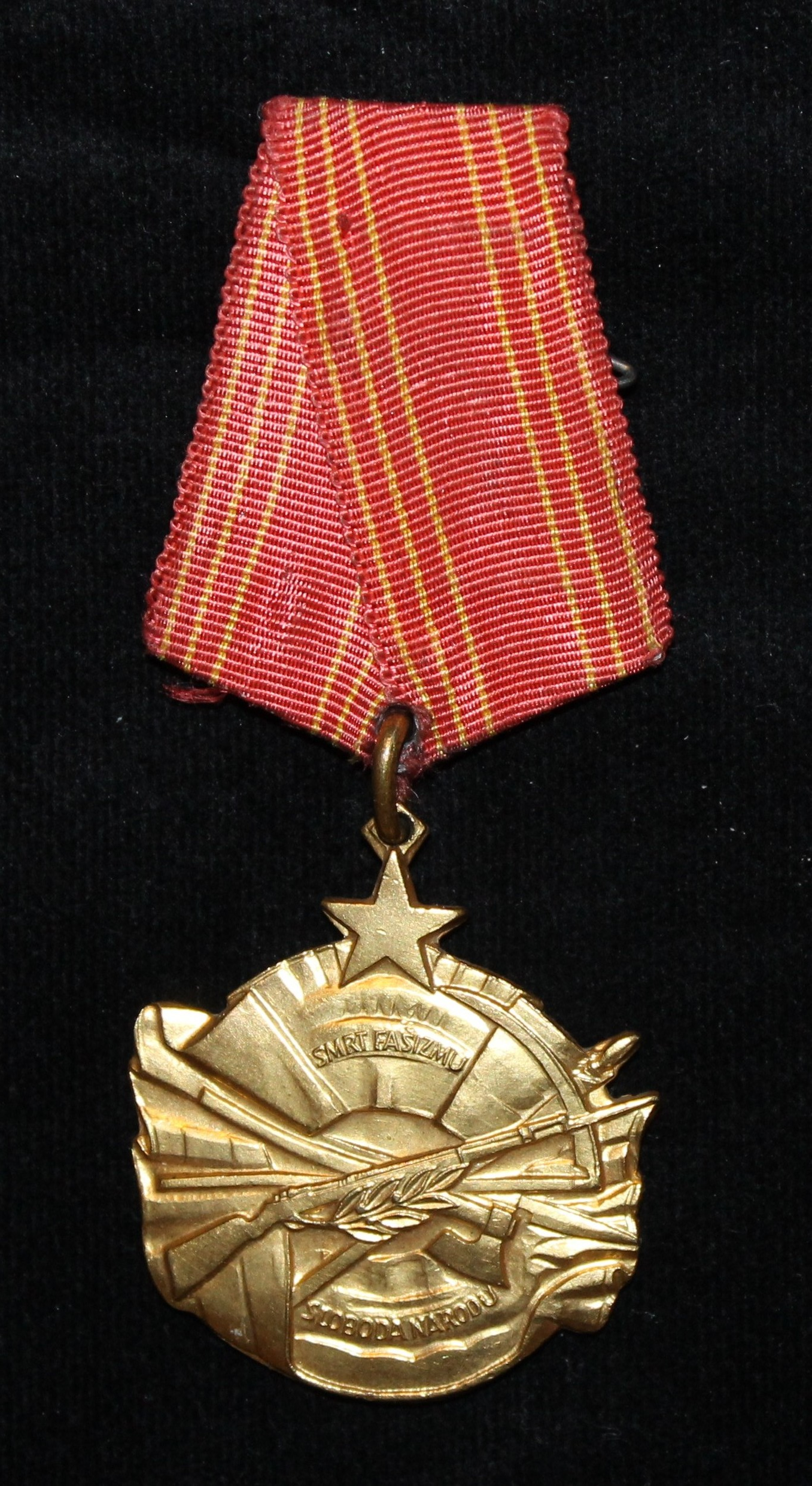 Орден за храброст додељиван у СФРЈ од 1943. до 1992. године